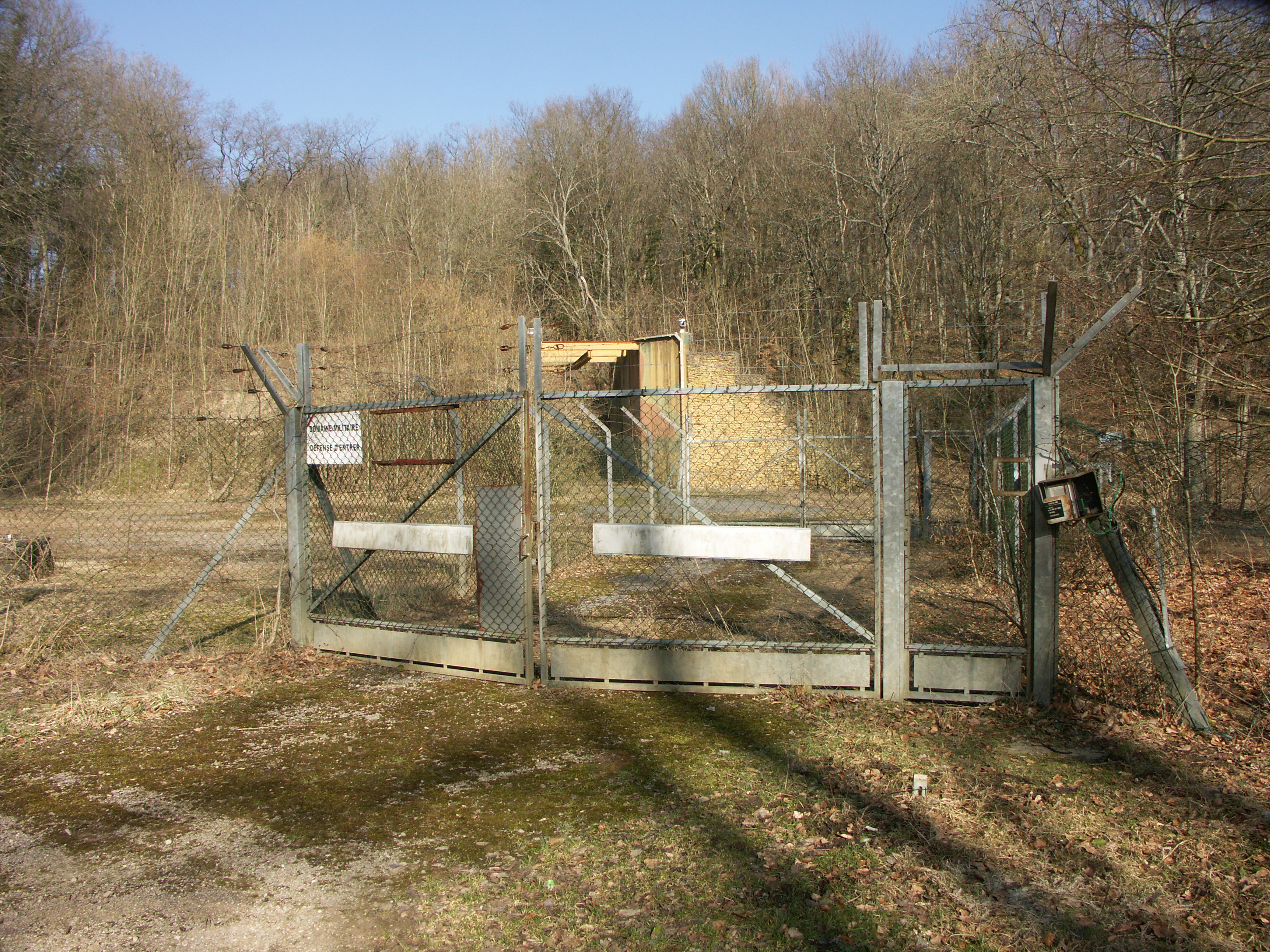 L'entrée des munitions de l'ouvrage de Rochonvillers